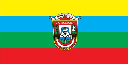 Bandera de Catacaos